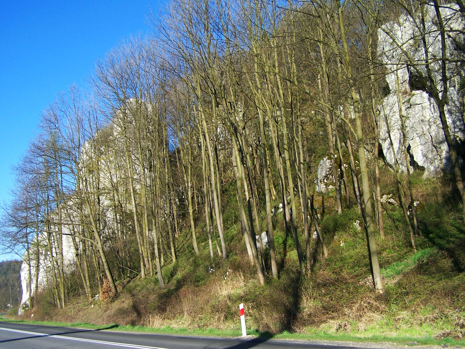 Nature reserve Skała Kmity